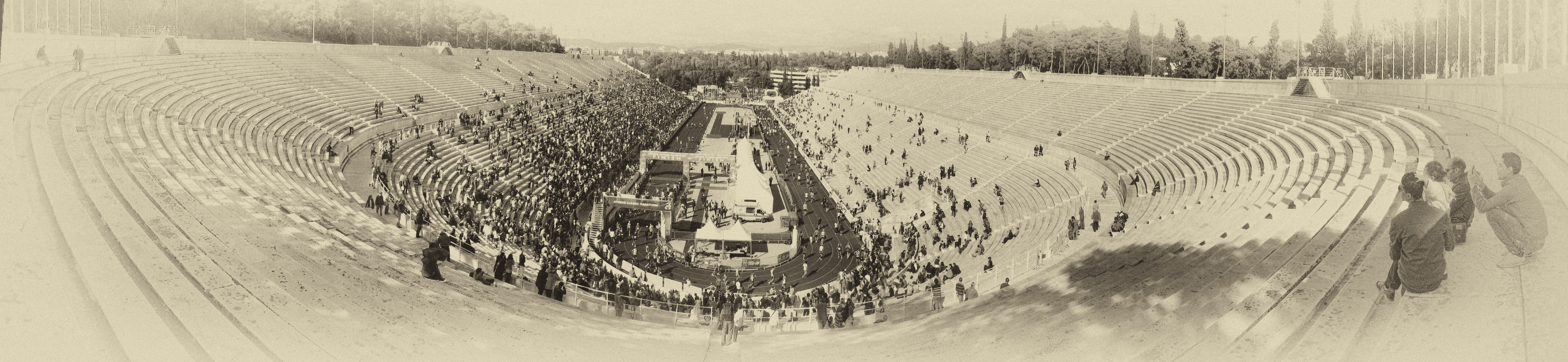 Panoramica del nuevo estadio de atletismo de Panathinaikó en Atenas (Grecia), llegada de los corredores del 30º Athens Classic Marathon.